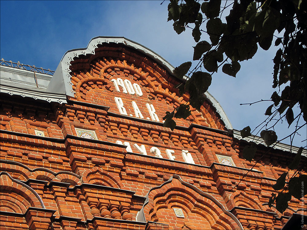 Краеведческий музей Владимира. Фрагмент фасада.